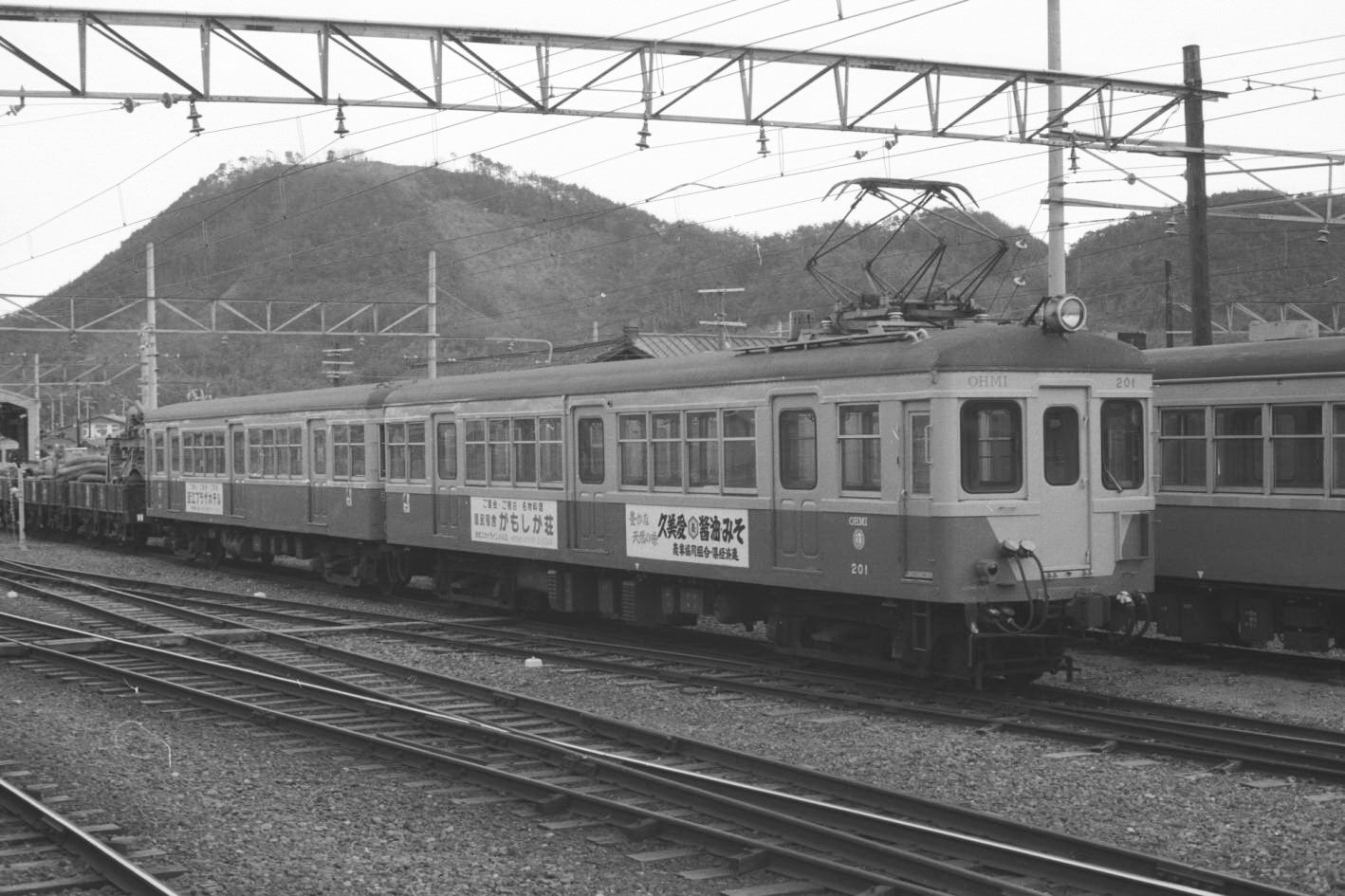 Oumi Tetudou Moha 201